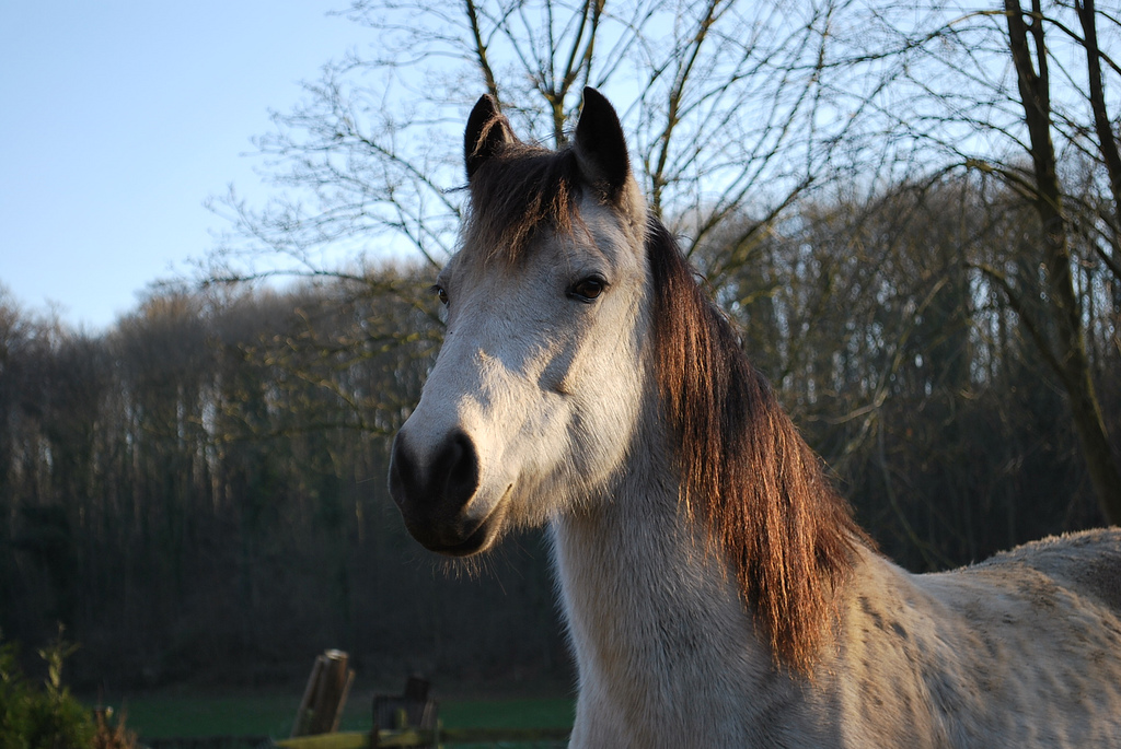 Tête d'un poney Connemara, Orkane de Couteloope.